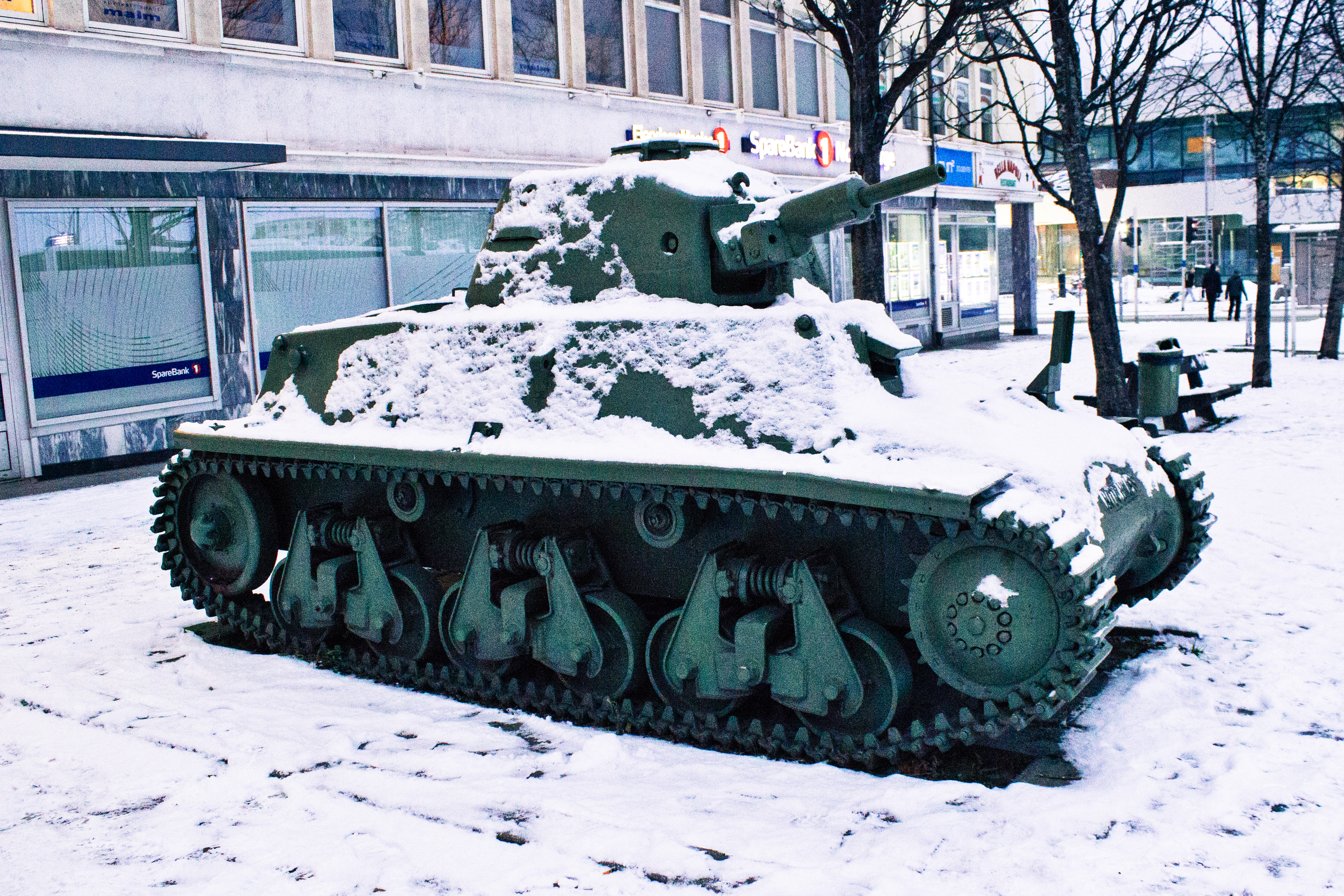 Carro de combate Hotchkiss H35 [H39] na cidade norueguesa de Narvik.